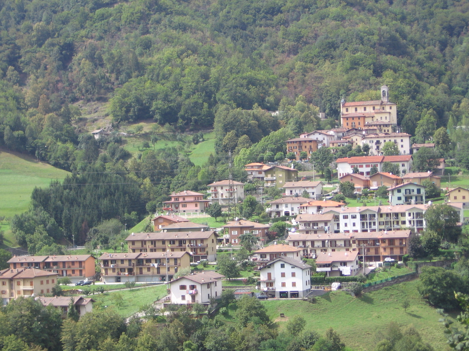 Camerata Cornello, Bergamo, Italy